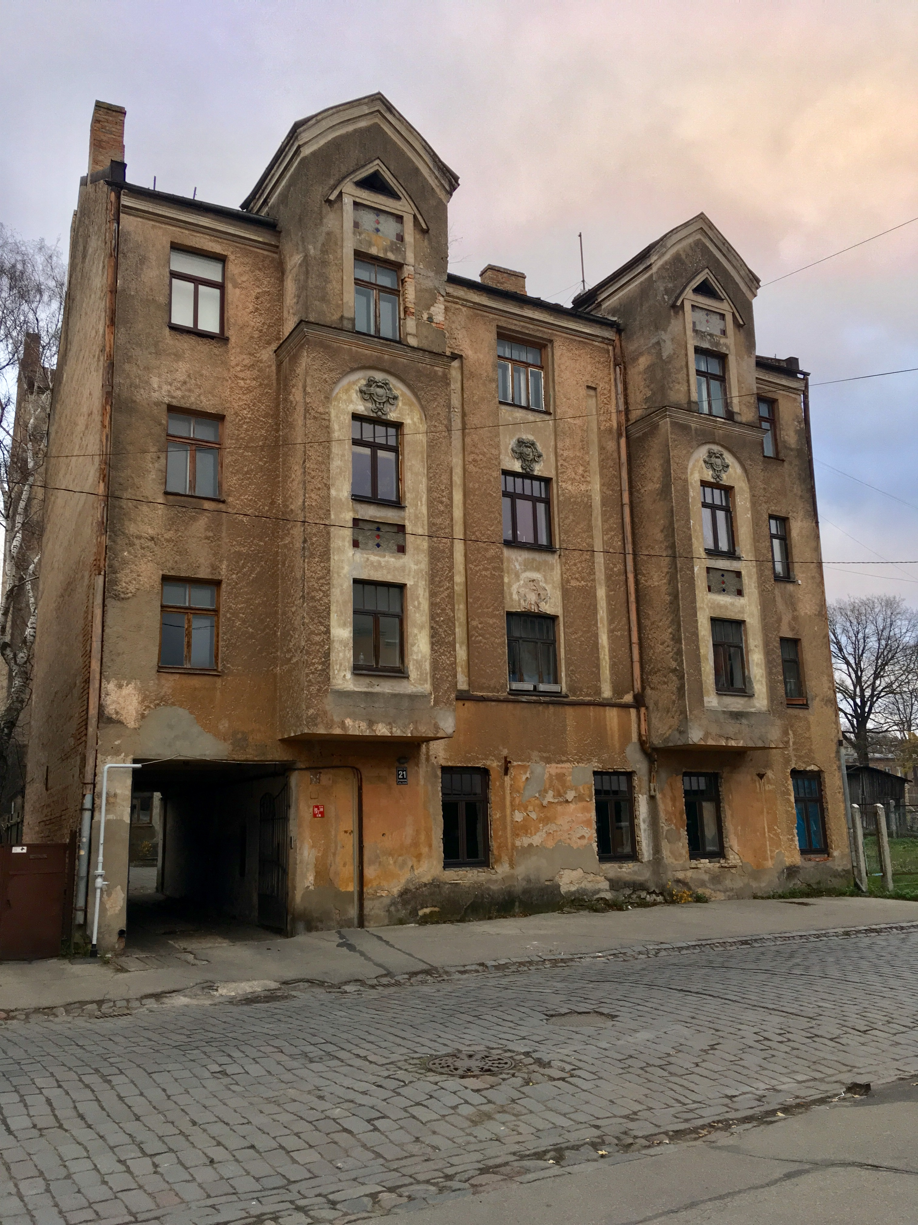 Dzīvojamā ēka Jersikas ielā 21, Rīgā (1912; vietējas nozīmes arhitektūras piemineklis (Nr. 7821))